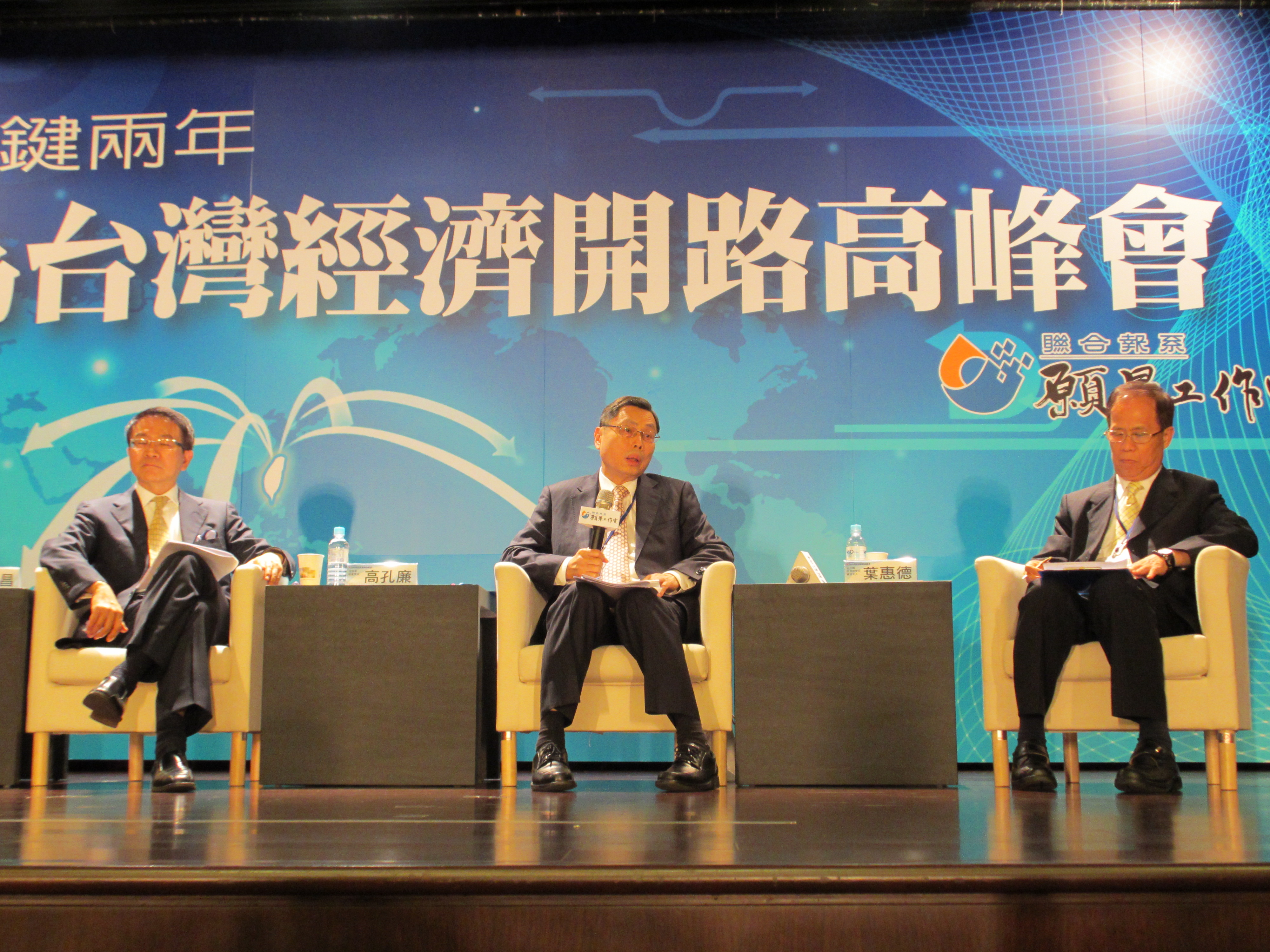 中文（台灣）: 聯合報系願景工作室舉辦「關鍵兩年－為台灣經濟開路高峰會」。左起：洪奇昌、高孔廉、葉惠德。